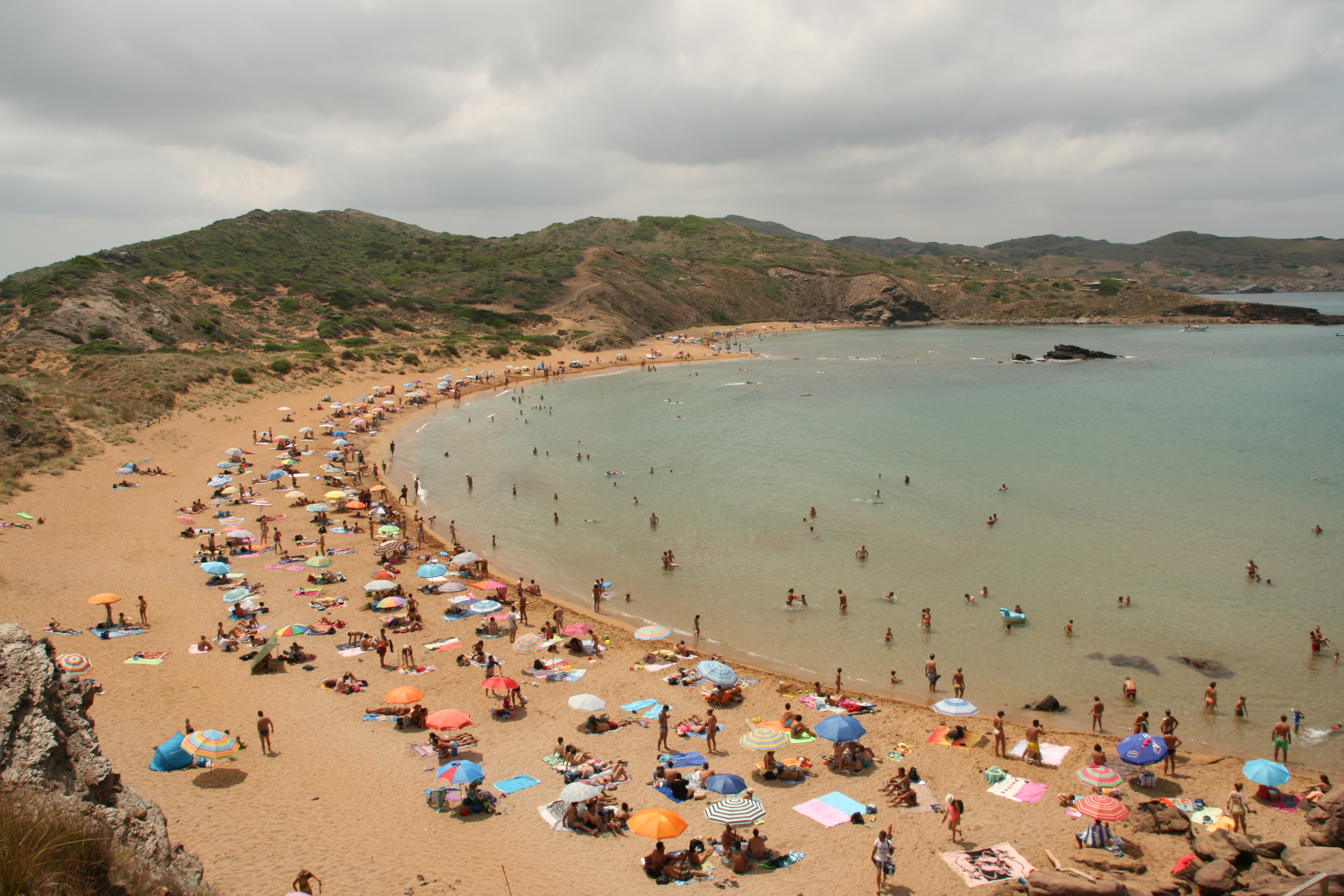 Platges de Cavalleria This is a photography of a Special Area of Conservation in Spain with the ID: ES0000231. Natura2000 entry, EEA entry